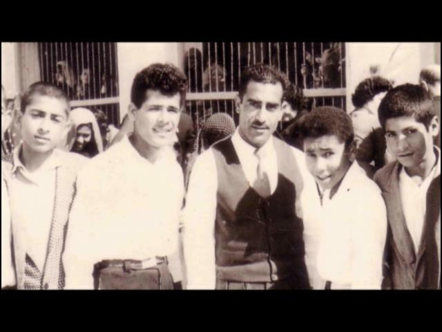 محمد شریفیان در کنار دوستداران خود